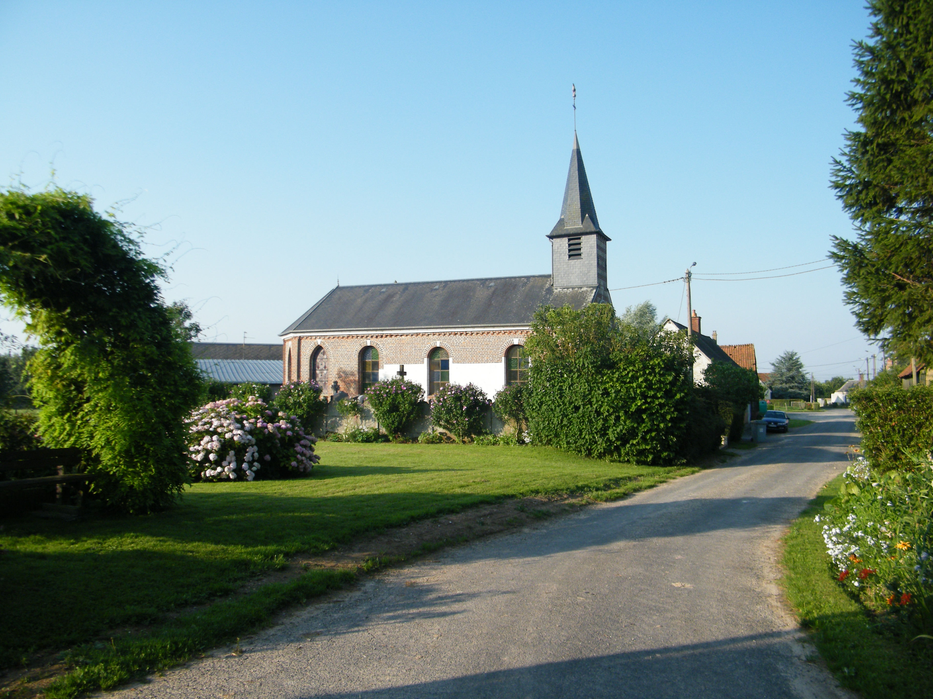 église.